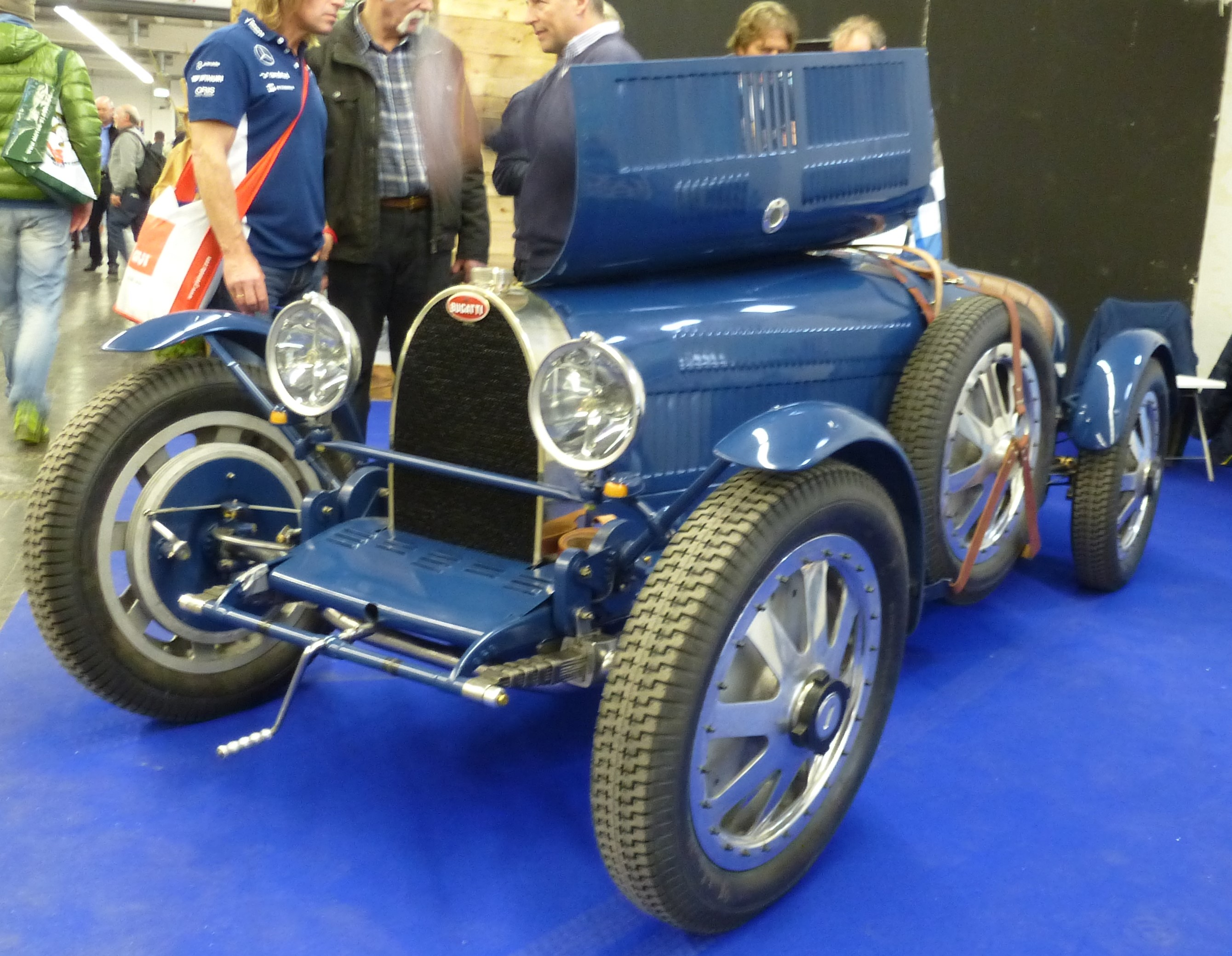 Pur Sang Bugatti 35 B Roadster